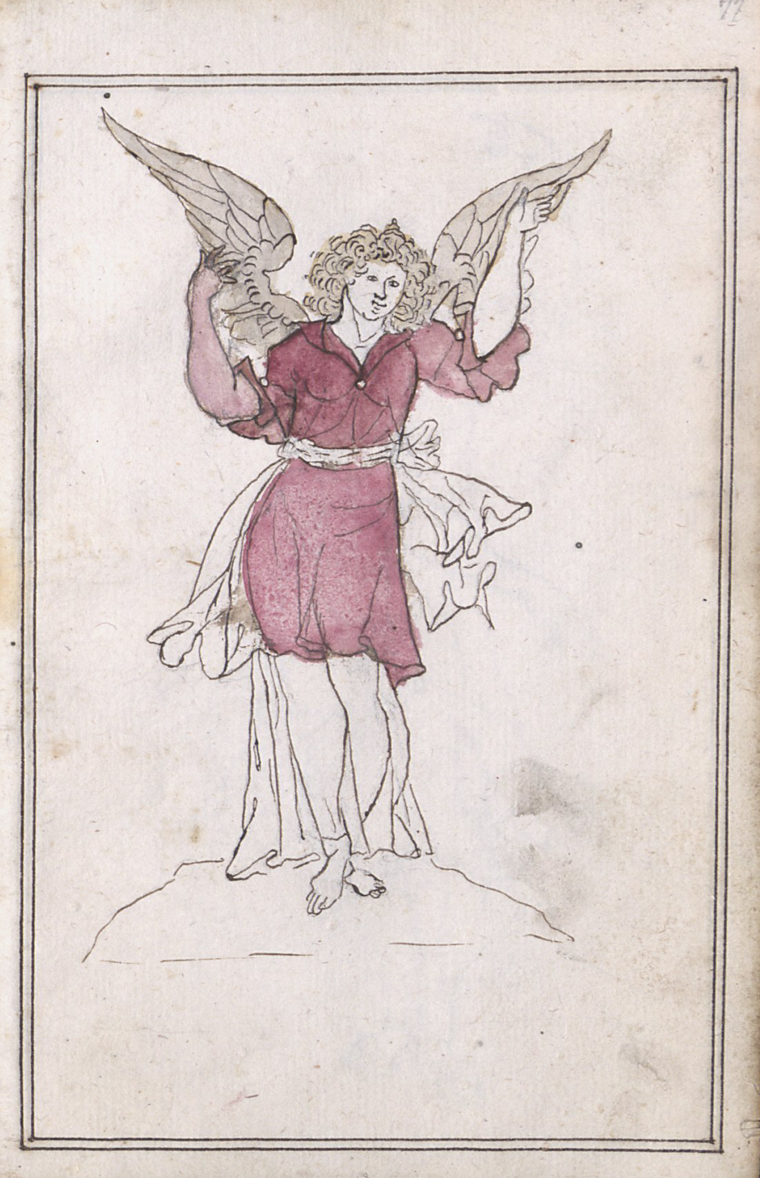 Architectura Capucinorum, Handschrift, 17. Jh., Württembergische Landesbibliothek, Cod. Don. 879, fol. 77r, Zeichnung Engel